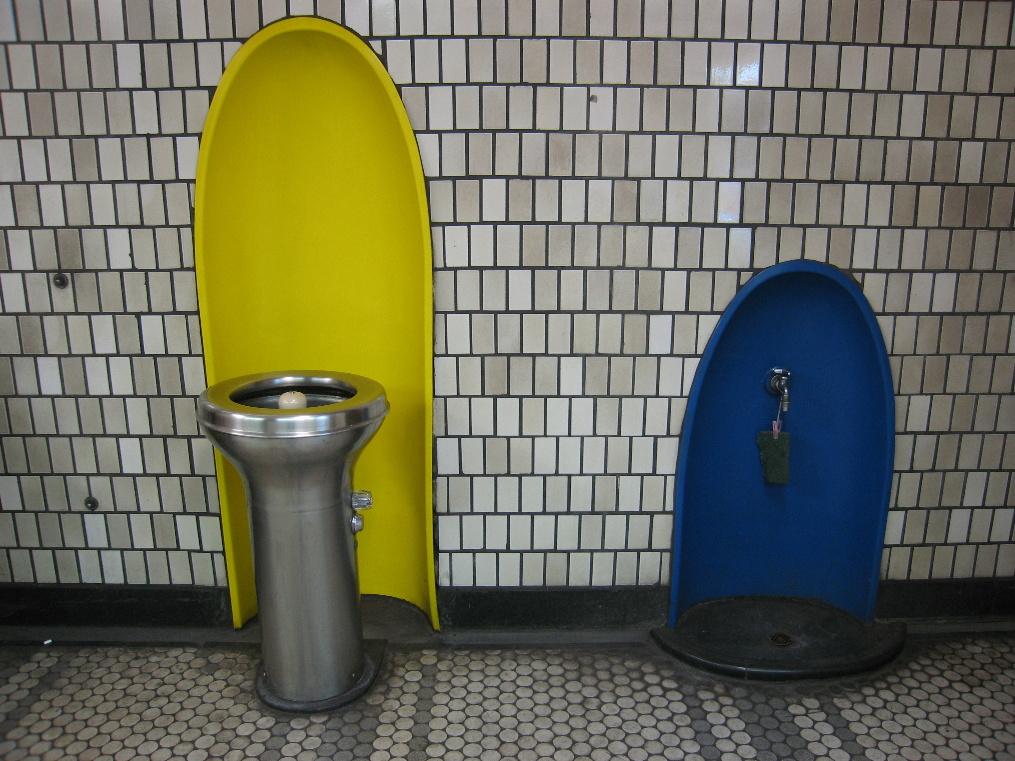 "Drinking fountain" (design by Sori Yanagi 1973) Yokohama Municipal Subway , Yokohama, Japan